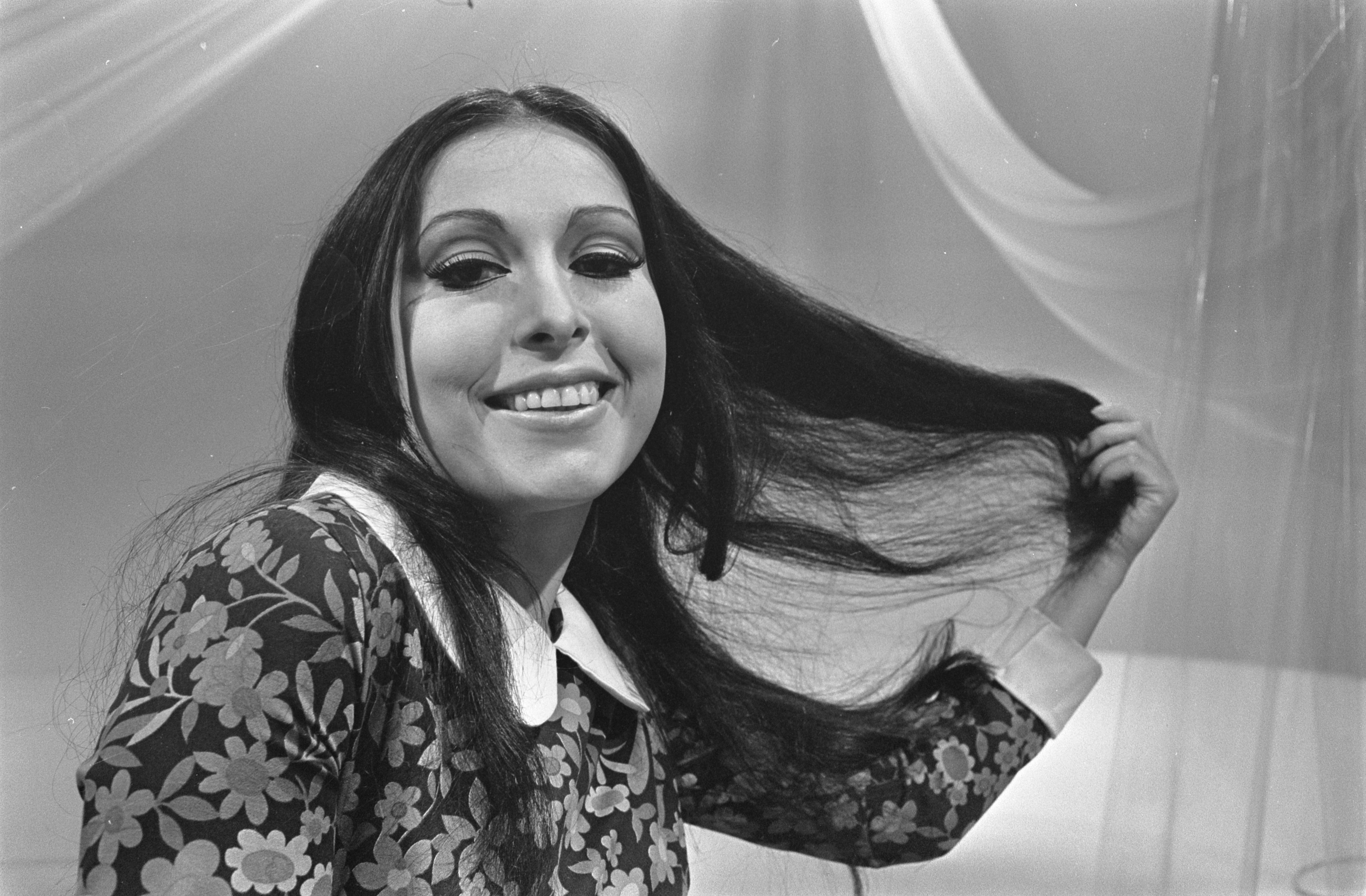 Collectie / Archief : Fotocollectie Anefo Reportage / Serie : [ onbekend ] Beschrijving : Spaanse zangeres Massiel, winnares Euro Song Festival tijdens opname in studio KRO-TV Datum : 19 april 1968 Trefwoorden : zangeressen Fotograaf : Koch, Eric / Anefo Auteursrechthebbende : Nationaal Archief Materiaalsoort : Negatief (zwart/wit) Nummer archiefinventaris : bekijk toegang 2.24.01.05 Bestanddeelnummer : 921-2648